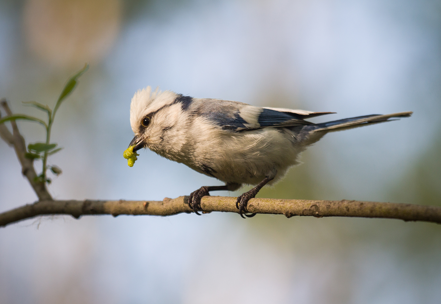 Болото Шава: От районного центра г. Кстово на юго-восток 18 км, от с. Запрудное на юго-запад 0,8 км и при д. Слободское с северо-востока,Кстовский район, Нижегородская область This image is related to the protected area of Russia number 5210317